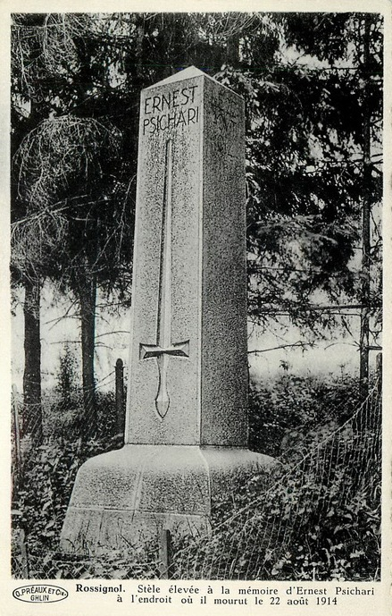 Stèle marquant le lieu du décès au combat du Lieutenant Ernest Psichari à Rossignol (Luxbg belge)